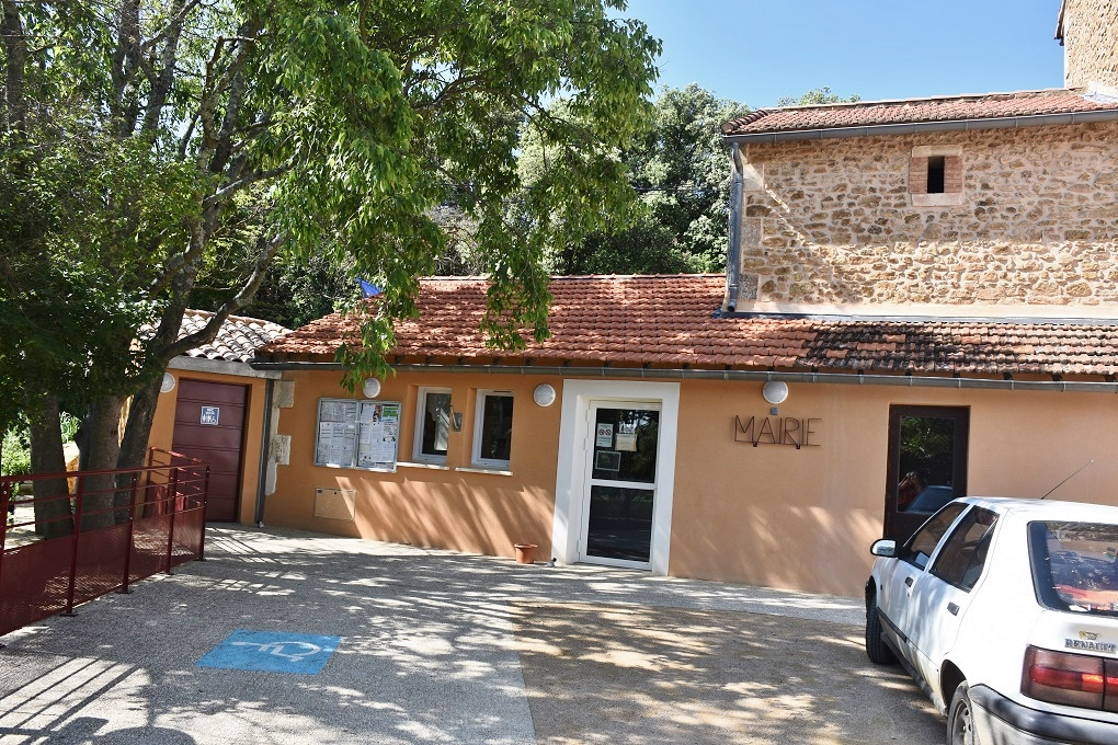 la mairie